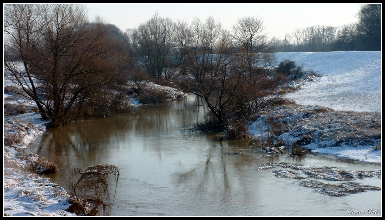 Garbolc, 4976 Hungary